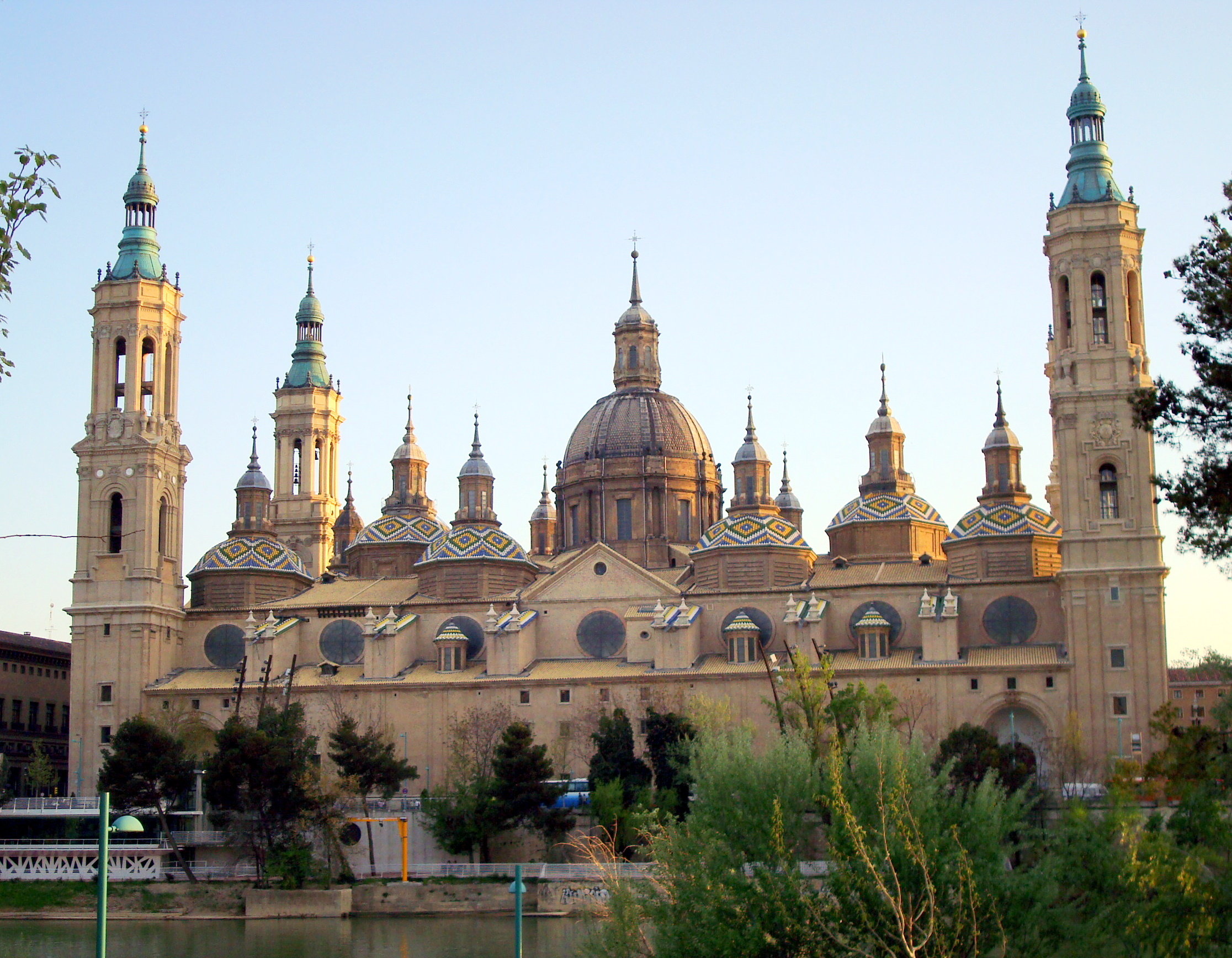 Catedral - Basílica de Nuestra Señora del Pilar